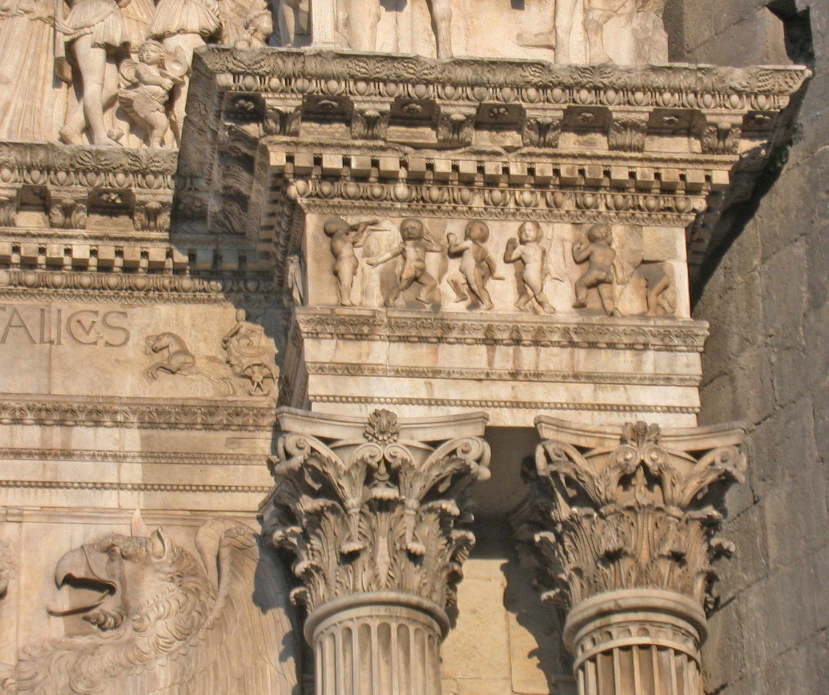 Italia, Campania, Napoli, Castel Nuovo (Maschio Angioino), arco trionfale di ingresso, ordine corinzio dell'arco inferiore e fregio con putti, particolare.